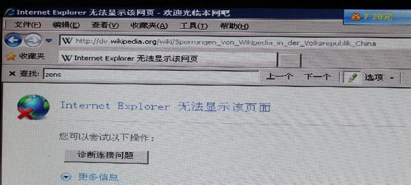 Sperrungen von Wikipedia in der Volksrepublik China. Browserfoto